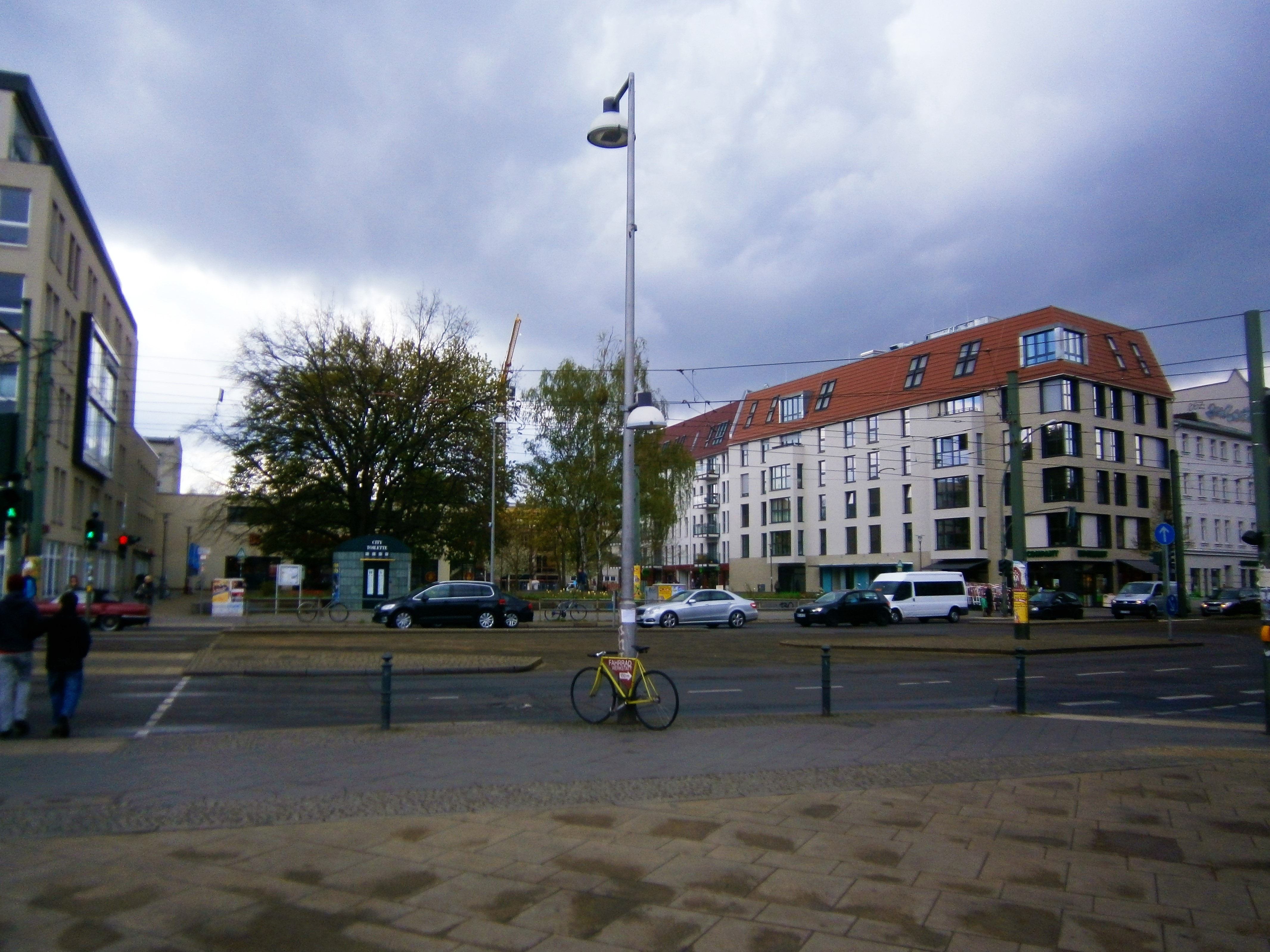 Der Antonplatz ist ein Platz im Berliner Ortsteil Weißensee (Bezirk Pankow). Die durch Bombenschäden 1943-1945 zerstörten Häuser an der Südseite gehörten als Adresse zur Berliner Allee. Speziell in der Berliner Allee 32 (damals Nr. 14) befanden sich 1910-1928 die Anton-Lichtspiele, zeitweilig als Trianon-Lichtspiele benannt. Im Nachbarhaus damals Nr. 13 (seit 1951) als unbebautes Grundstück Nr. 30 befanden sich 1907-1943 die Universallichtspiele. Die zerstörten Gebäude wurde in der Nachkriegszeit beräumt. Auf dem Bild ist die Gestaltung nach 2000 zu sehen, Aufnahmepunkt gegenüberiegend vor dem Kino Toni. Im Haus Nummer 14 befanden sich 1912-1952 die Helmholtz-Lichtspiele. Das anfangs als Ladenkino eingerichtete Kinematographentheater für Stummfilmvorführungen befand sich im Haus im Erdgeschoss. Die Teilung in Haus 14 und 14a geht auf die alte Berliner Struktur I. Aufgang/ II. Aufgang. ES ist nicht nachweisbar aber wahrscheinlich, dass sich das Kino in den Räumen der heutigen Gaststätte befand.